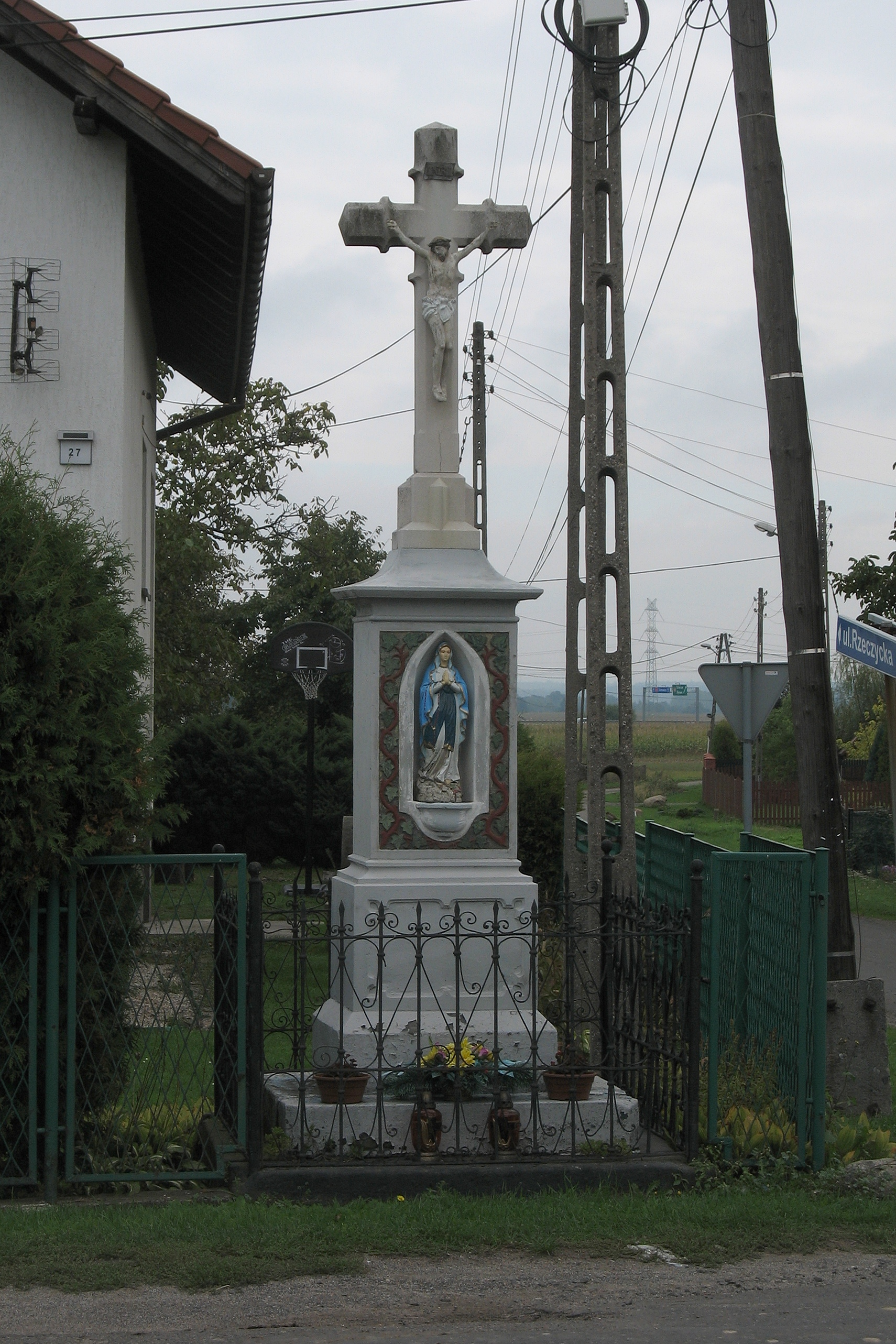 Przydrożny krzyz na ulicy Gliwickiej w Kleszczowie.